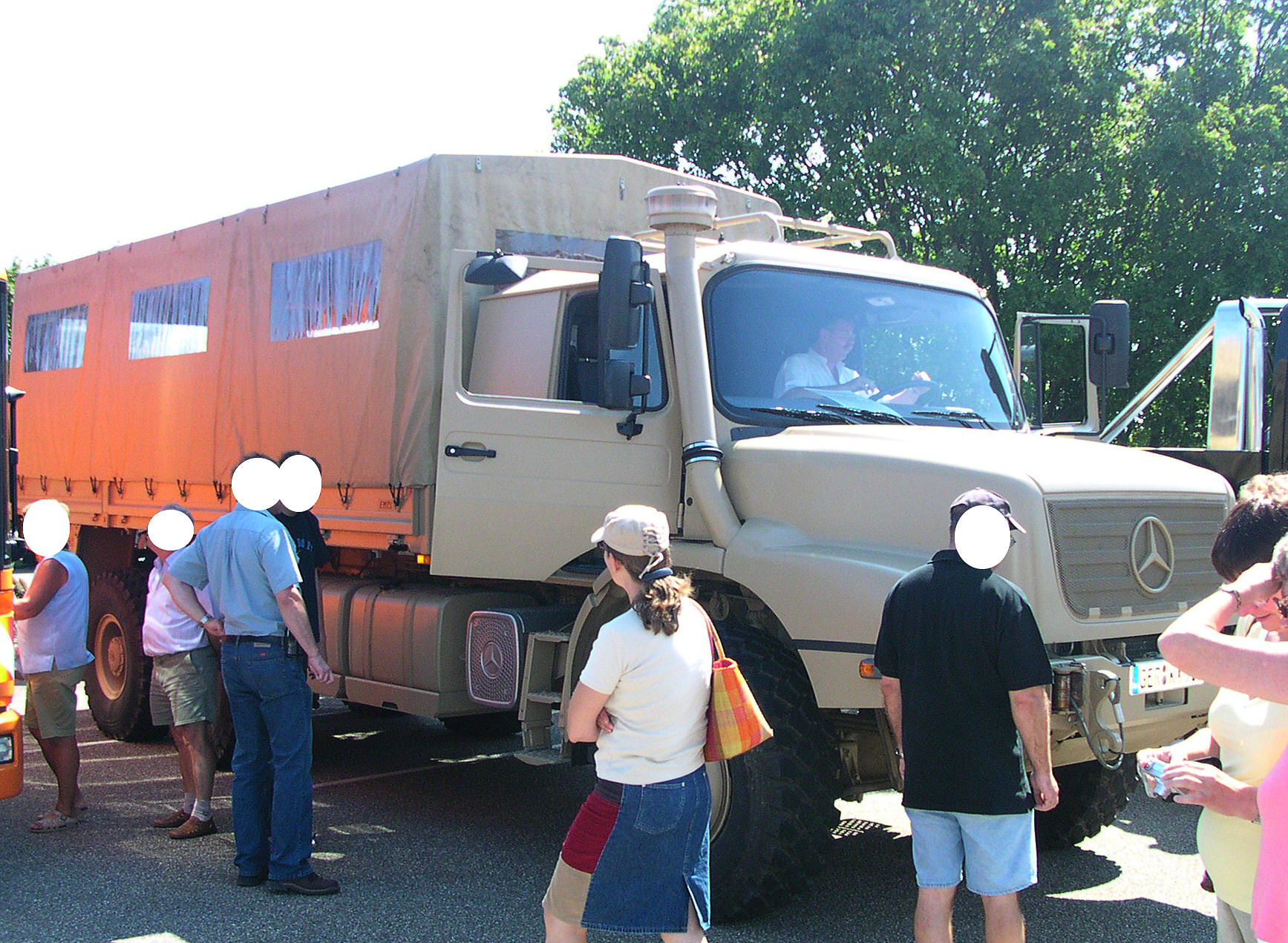 Oldtimertreffen bei Daimler Chrysler in Wörth am Rhein. Mercedes Militär-LKW S 2733 A 6x6, Motor 926917, 240 kW (326 PS), 1300 Nm bei 1200-1500/min